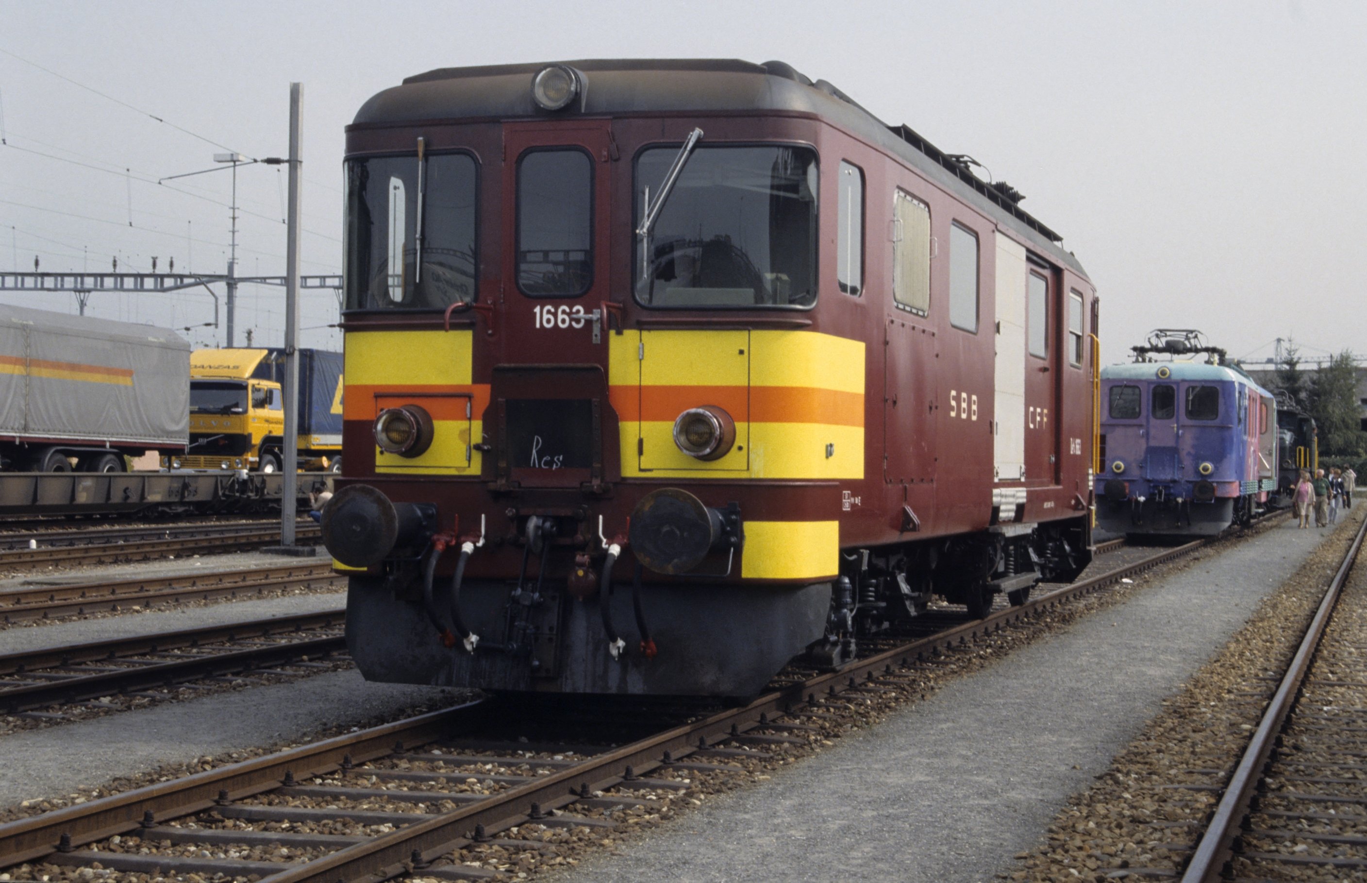 SBB 1663 Sonstiges: selbst fotografiert Freigabe: Ticket#: 2006062710012727